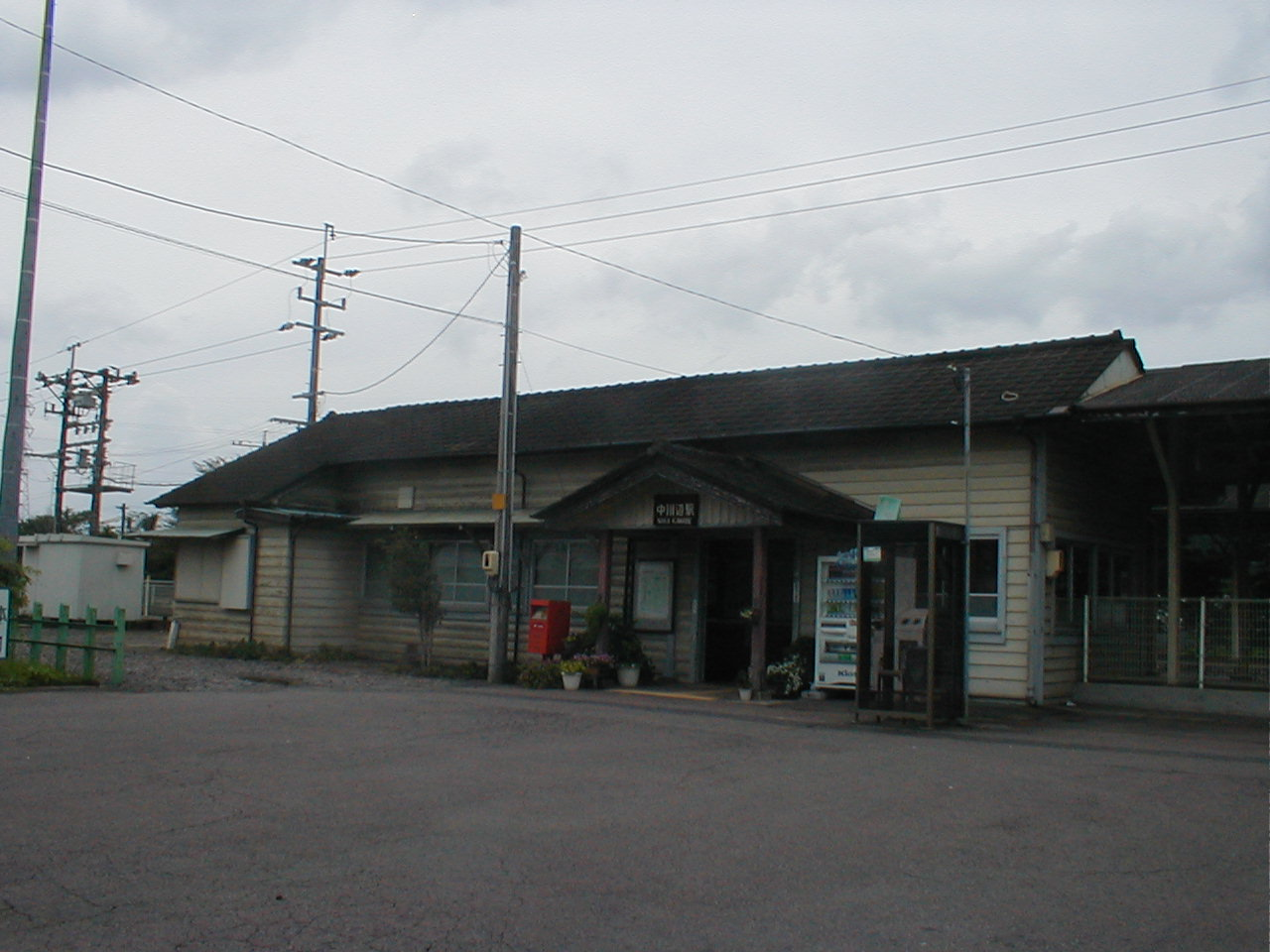 JR東海・高山線の中川辺駅、駅舎の正面